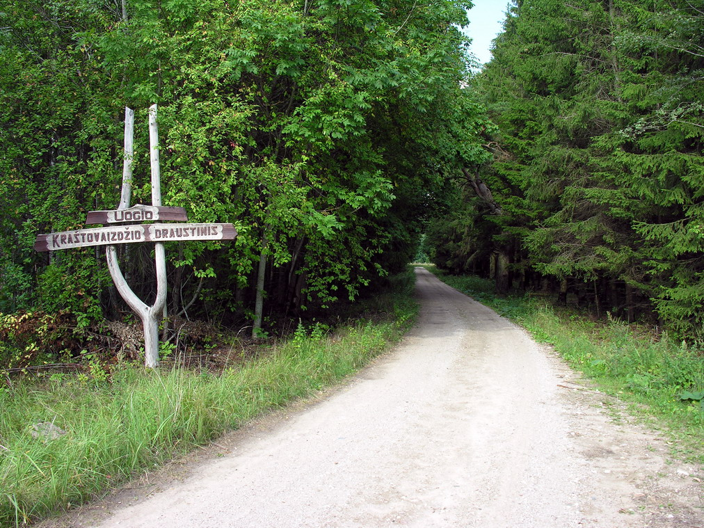 Ramoniškė, Mažeikių raj., Viekšnių seniūnija Kelias į Ramoniškę per Purvių mišką Foto: Algirdas, 2006 m. rugpjūčio 15 d., Lietuva